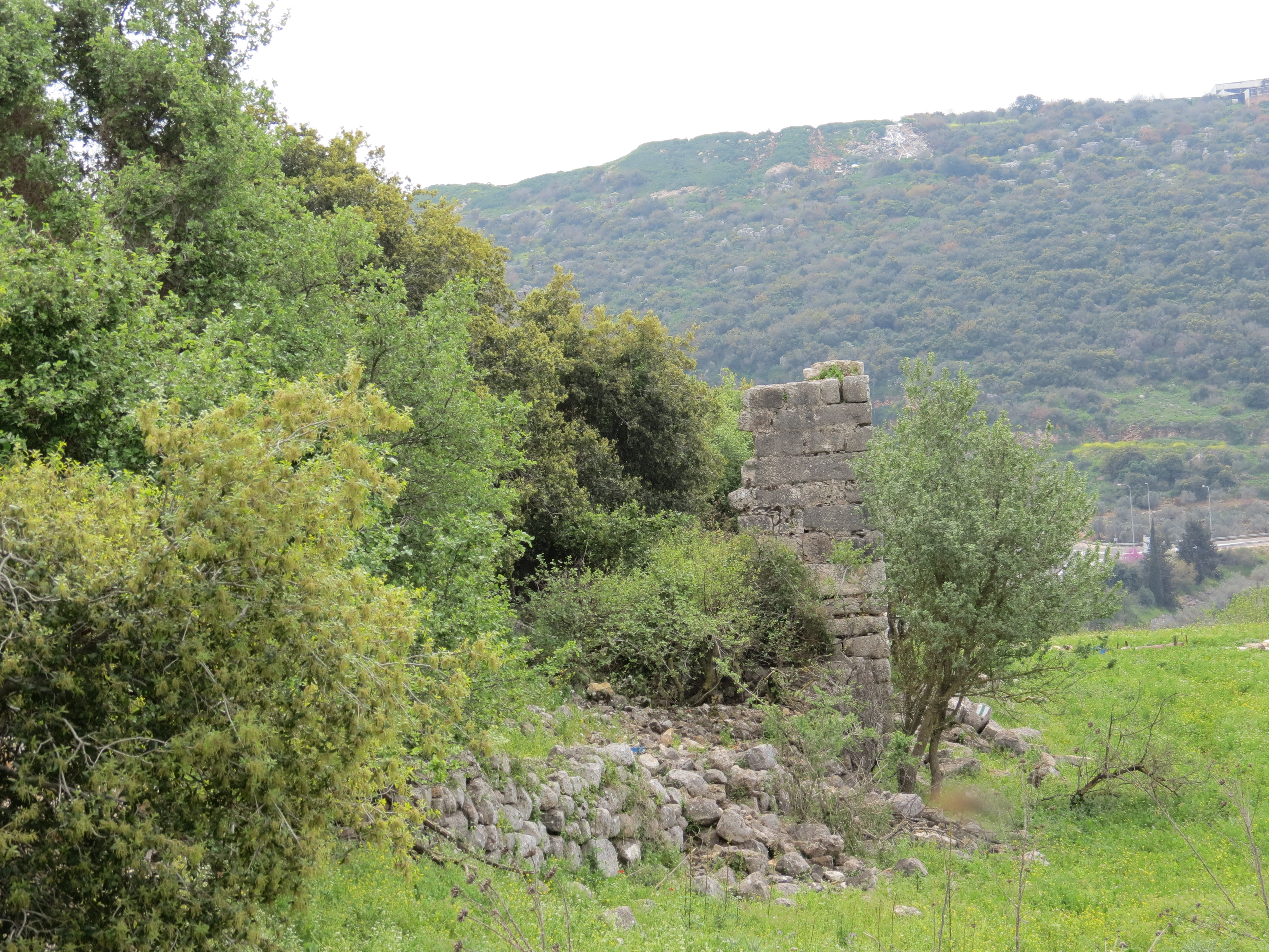 חורבת מחוז